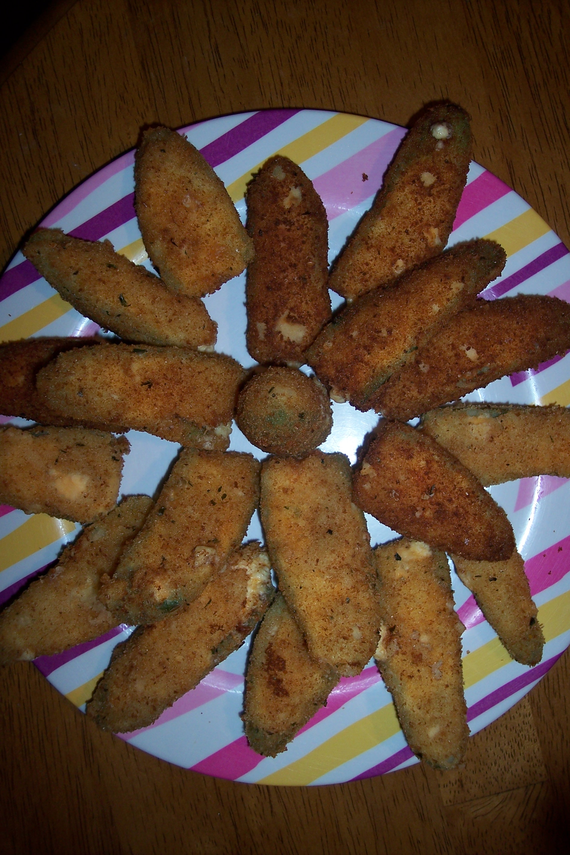 Jalapeno poppers.